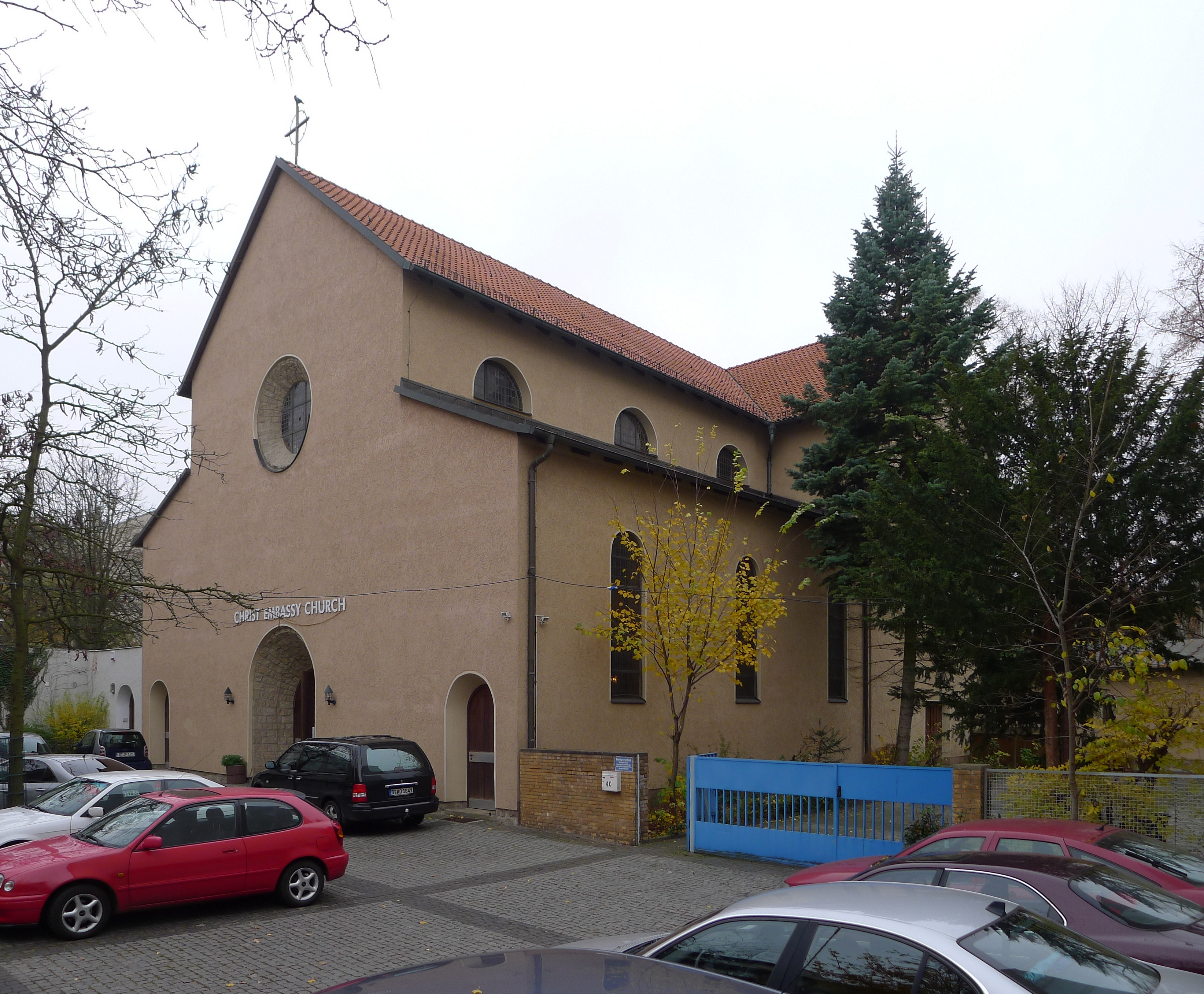 Blick von der Bandelstraße auf die Kirche